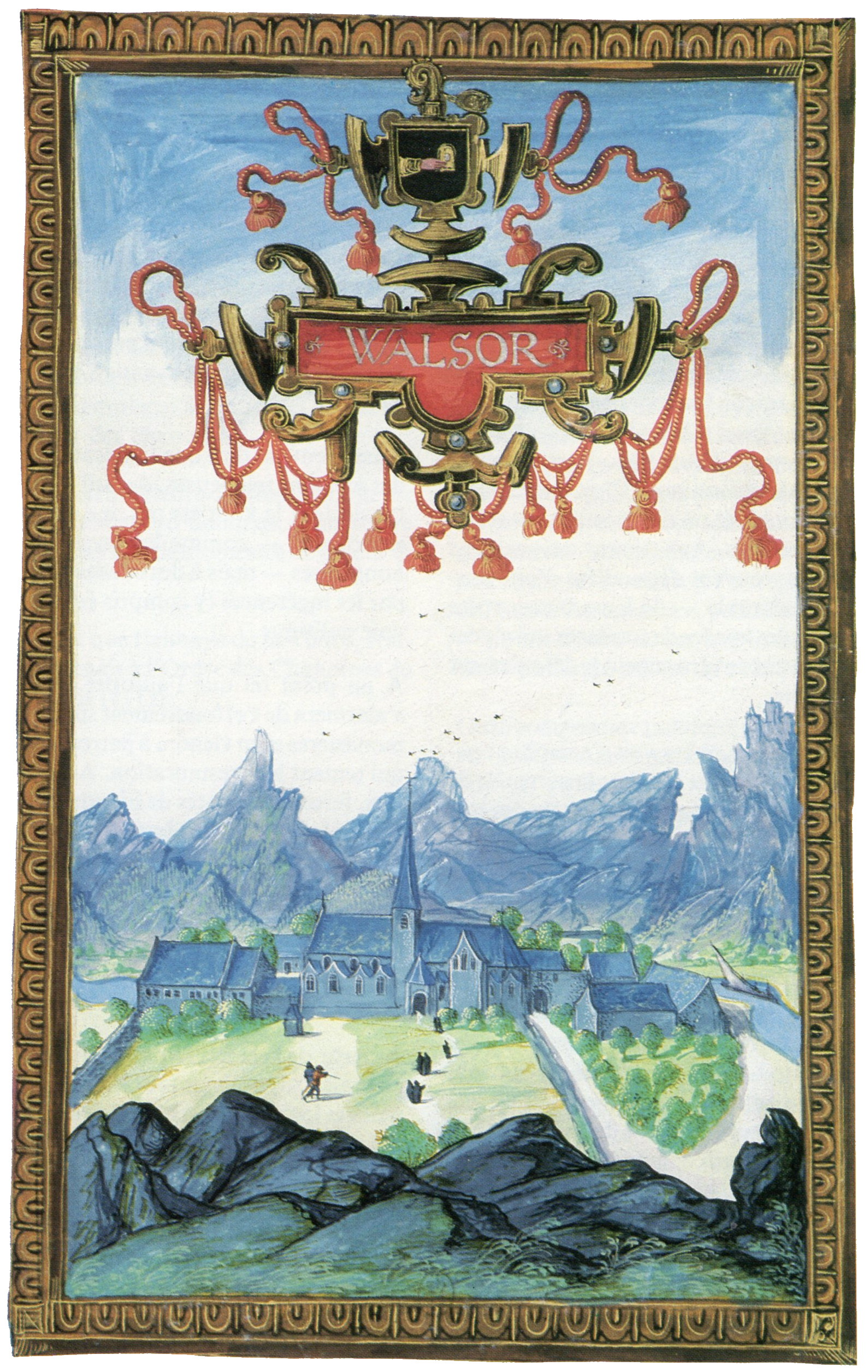 Abbaye de Waulsort en 1604. Albums de Croÿ, Paris, Bibliothèque nationale.